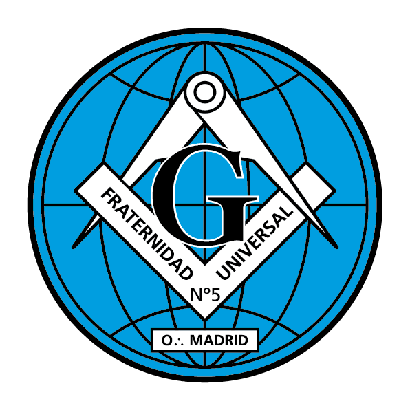 Emblema de la R.·.L.·.S.·. Fraternidad Universal nº 5. Logia masónica en Madrid.